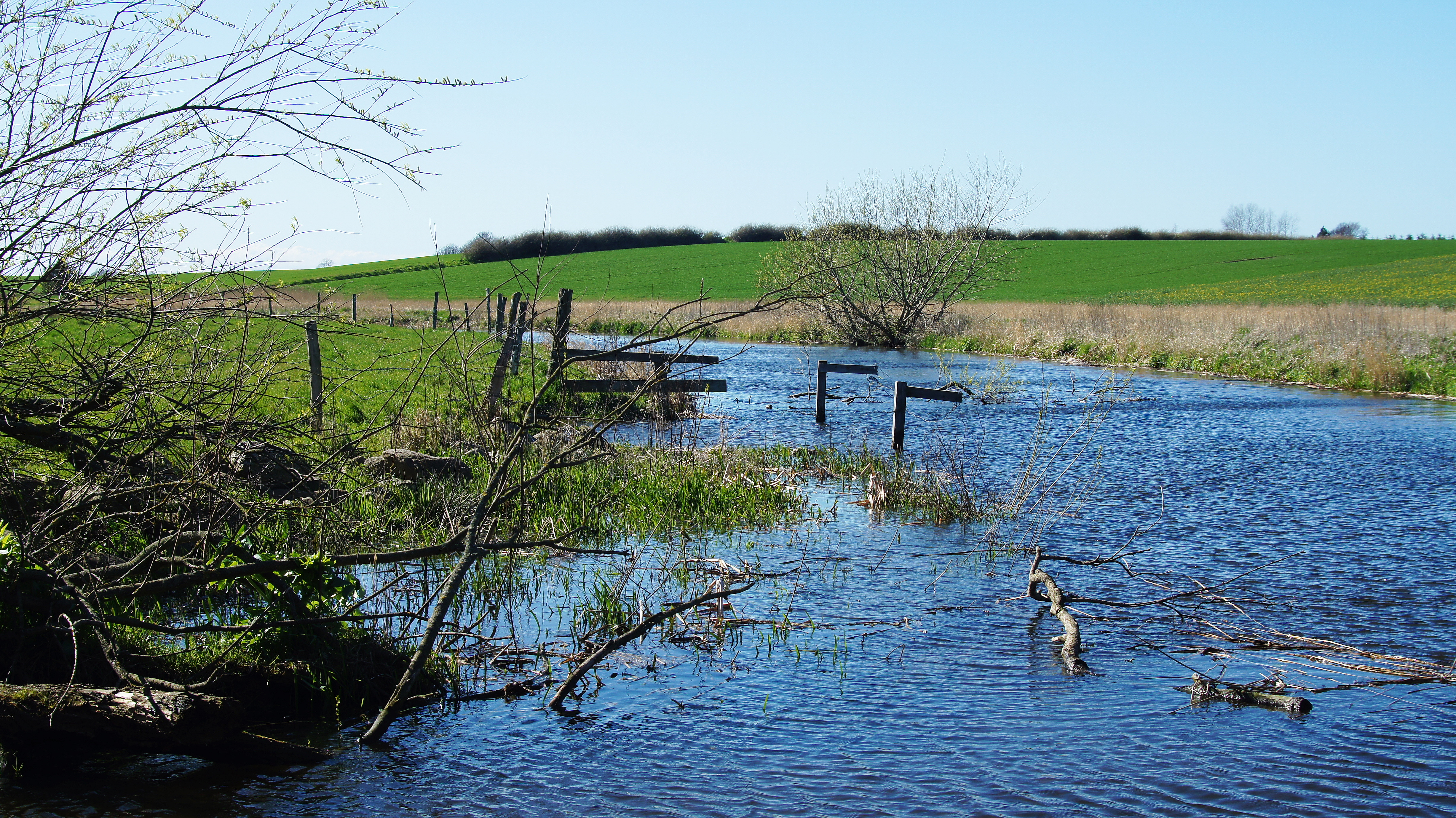 Tude Å